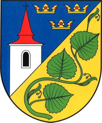 Znak obce Lipec